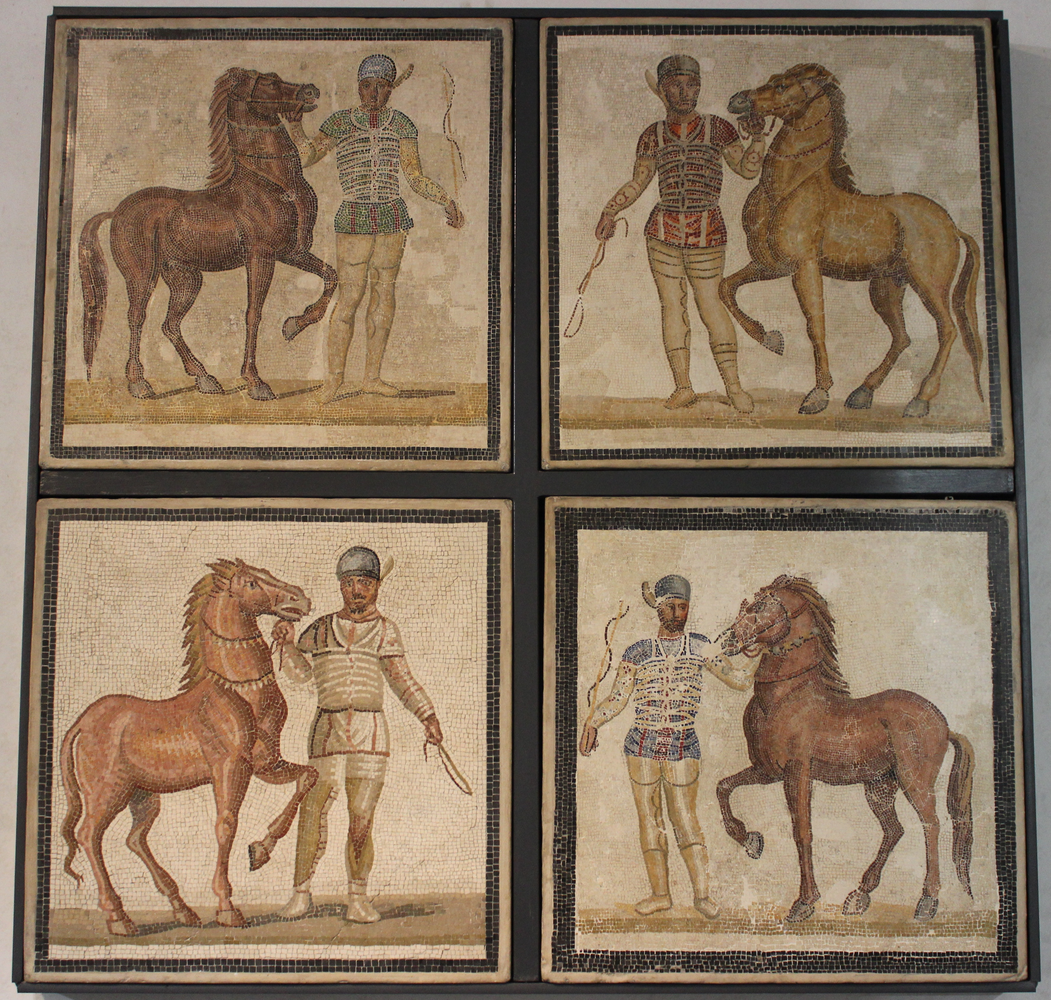 Palazzo Massimo alle Terme, mosaico romano.